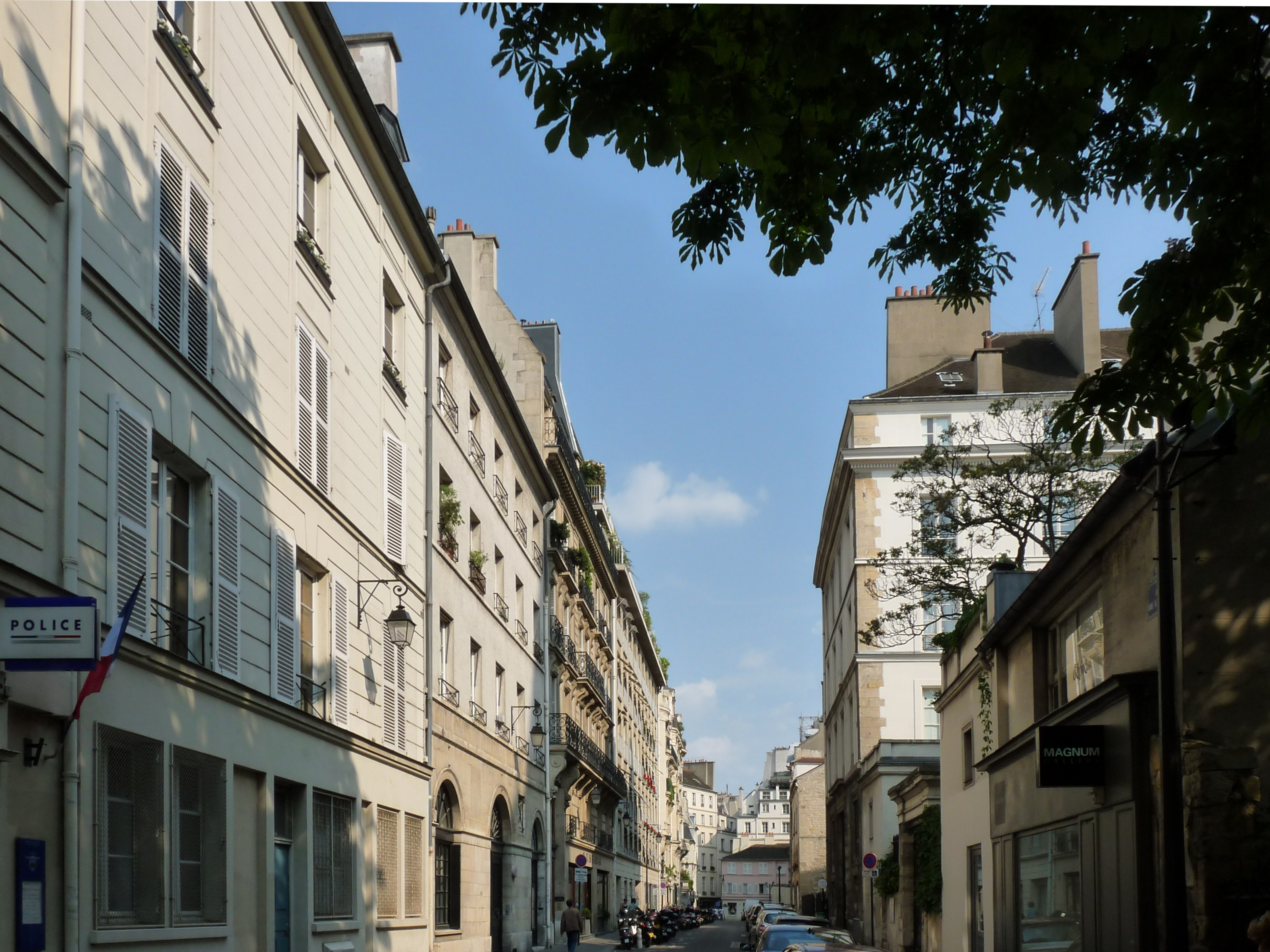 La rue de l'abbaye à Paris, vue en direction de la rue de Furstemberg.